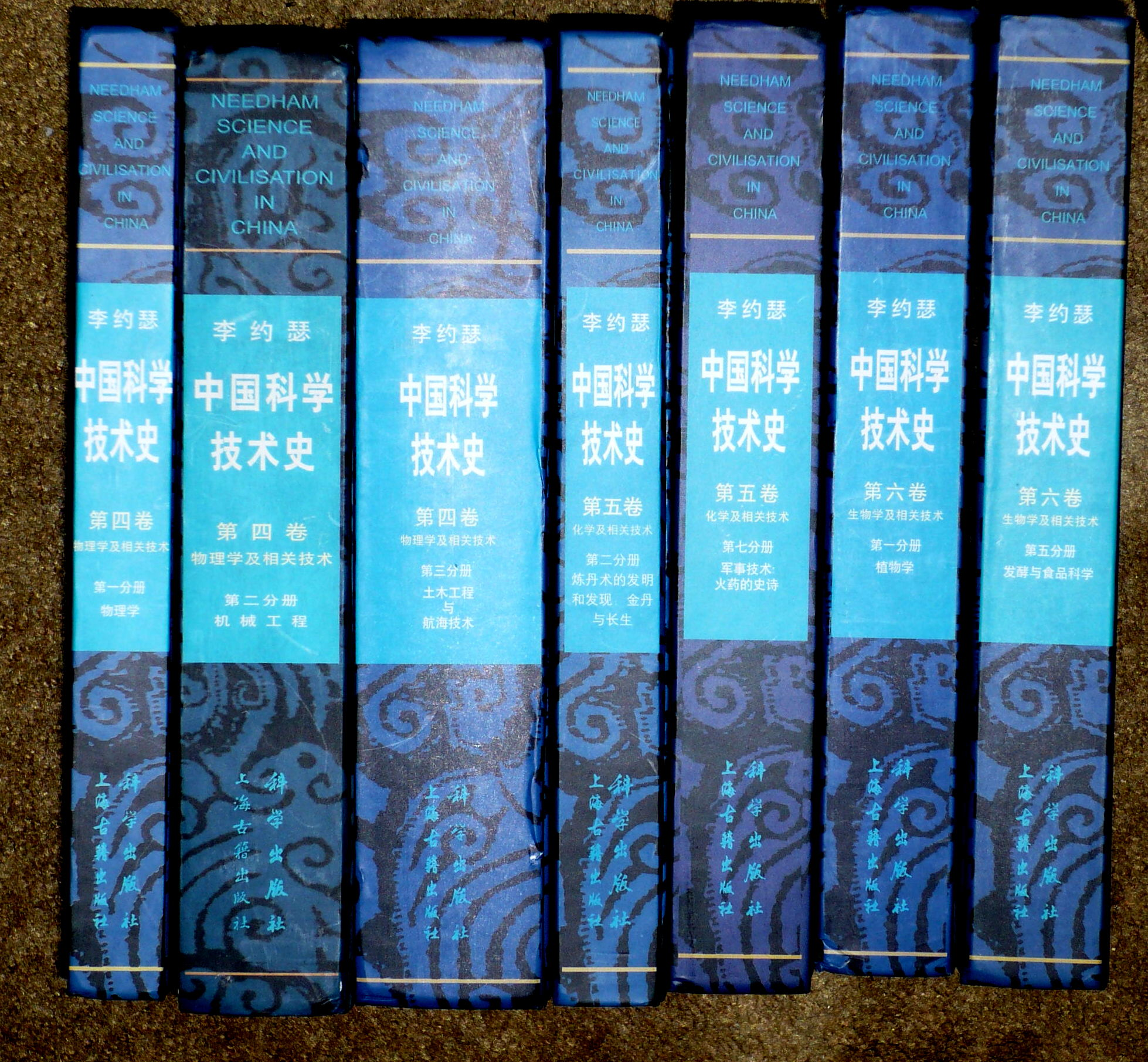 中文（中国大陆）: 李约瑟中国科学技术史（小部分）